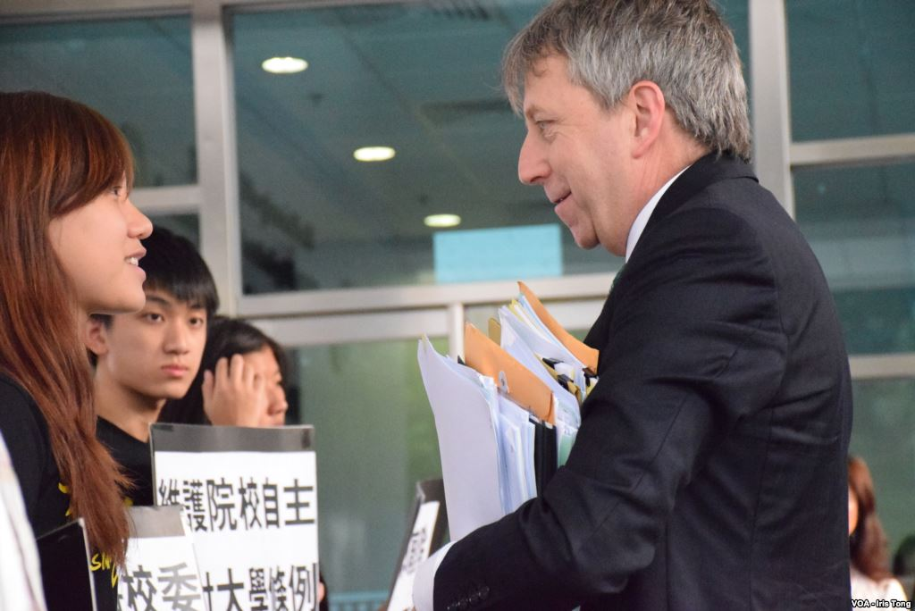 香港大學校長馬斐森進入校委會會議前與抗議的學生會代表交談。(美國之音湯惠芸攝 )